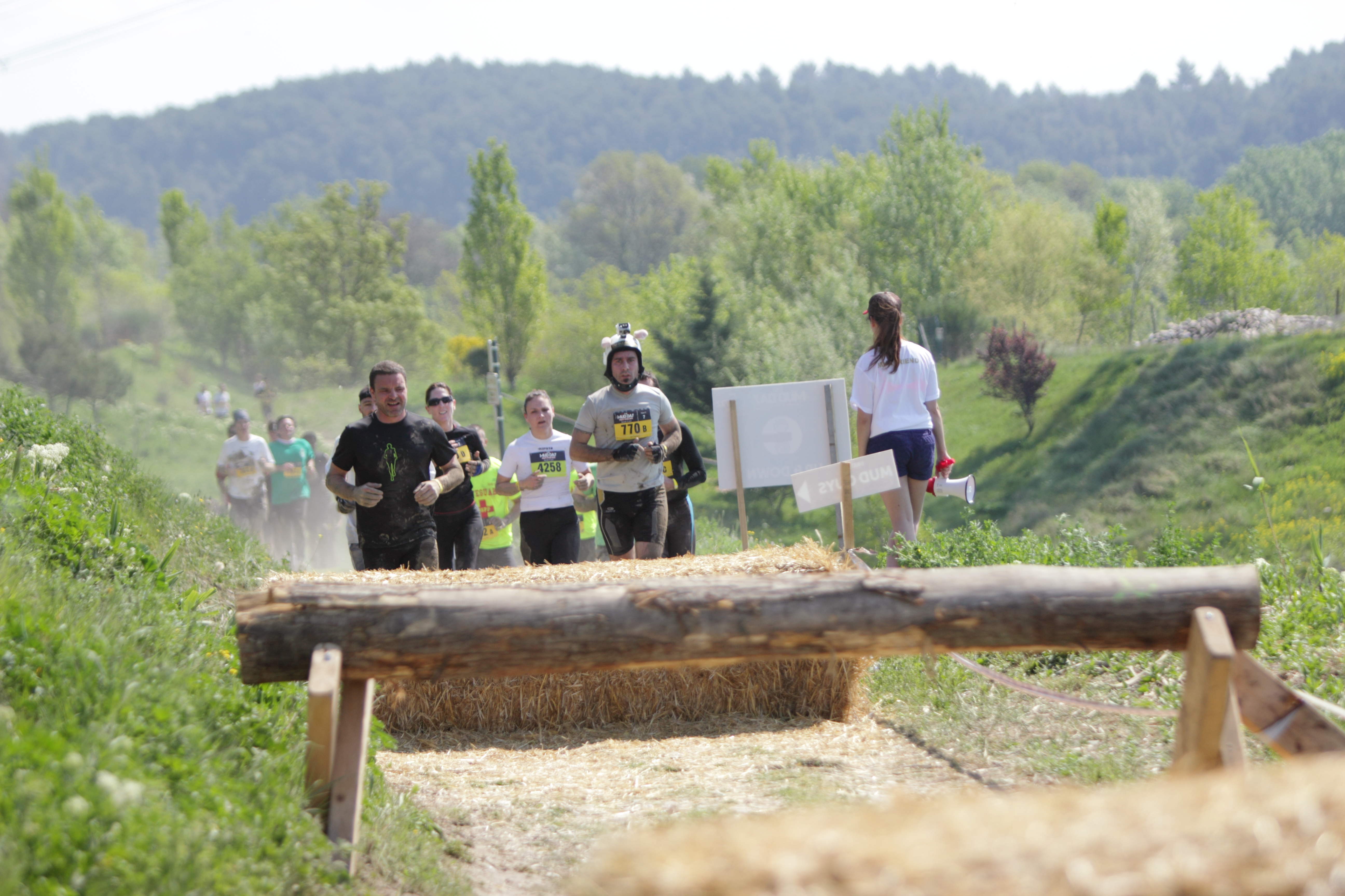 Up and down. Mud Day Pays d'Aix 2014.